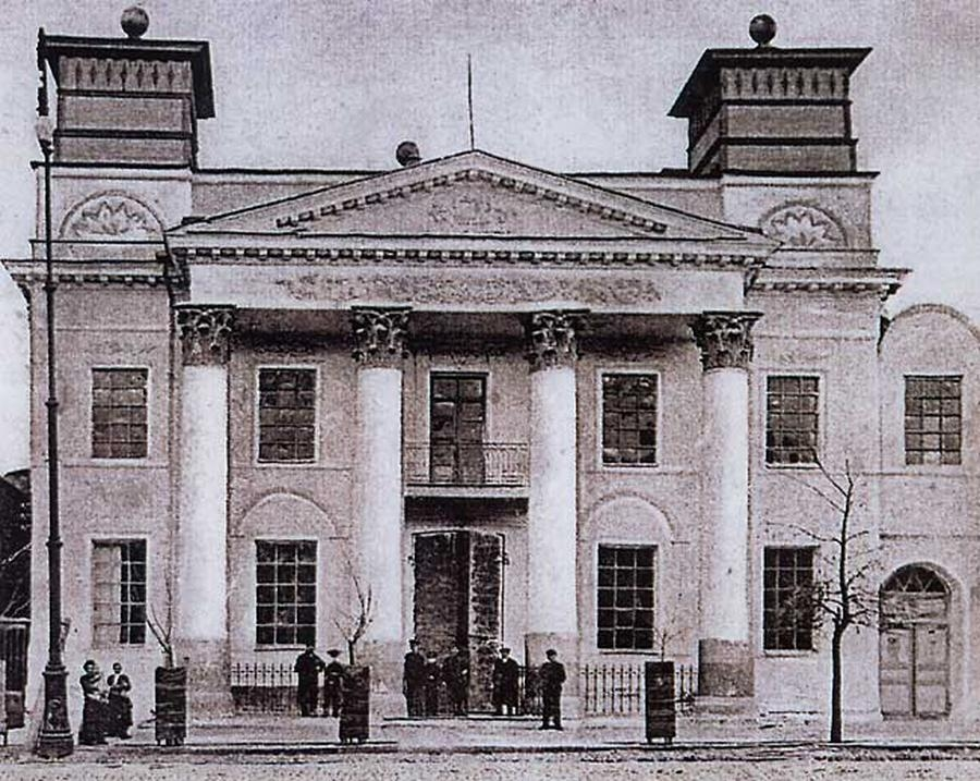 Синагогу "Золота Роза" у Дніпропетровськ